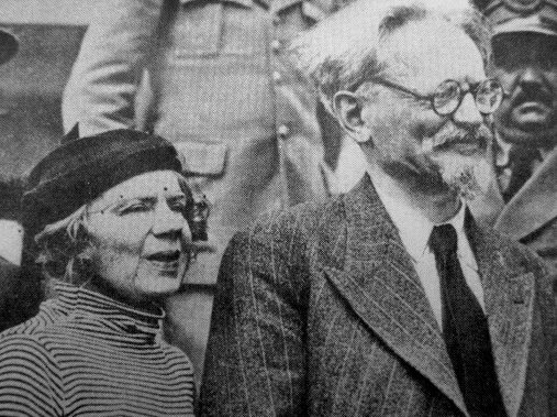 Л.Д.Троцкий с женой Натальей.Тампико,Мексика,январь 1937